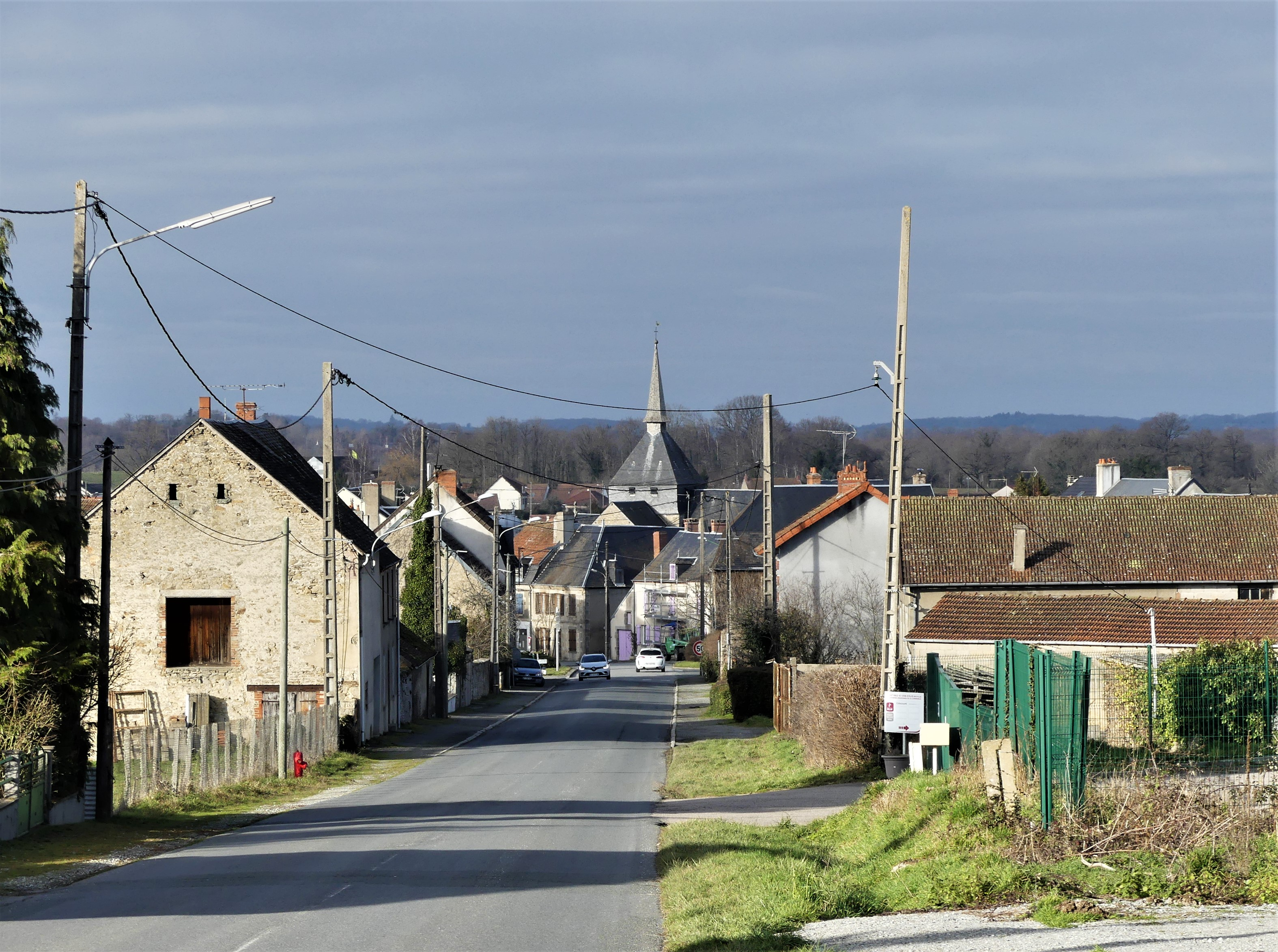 L'entrée sud-est du bourg de Jarnages par la route départementale 990, Creuse, France.